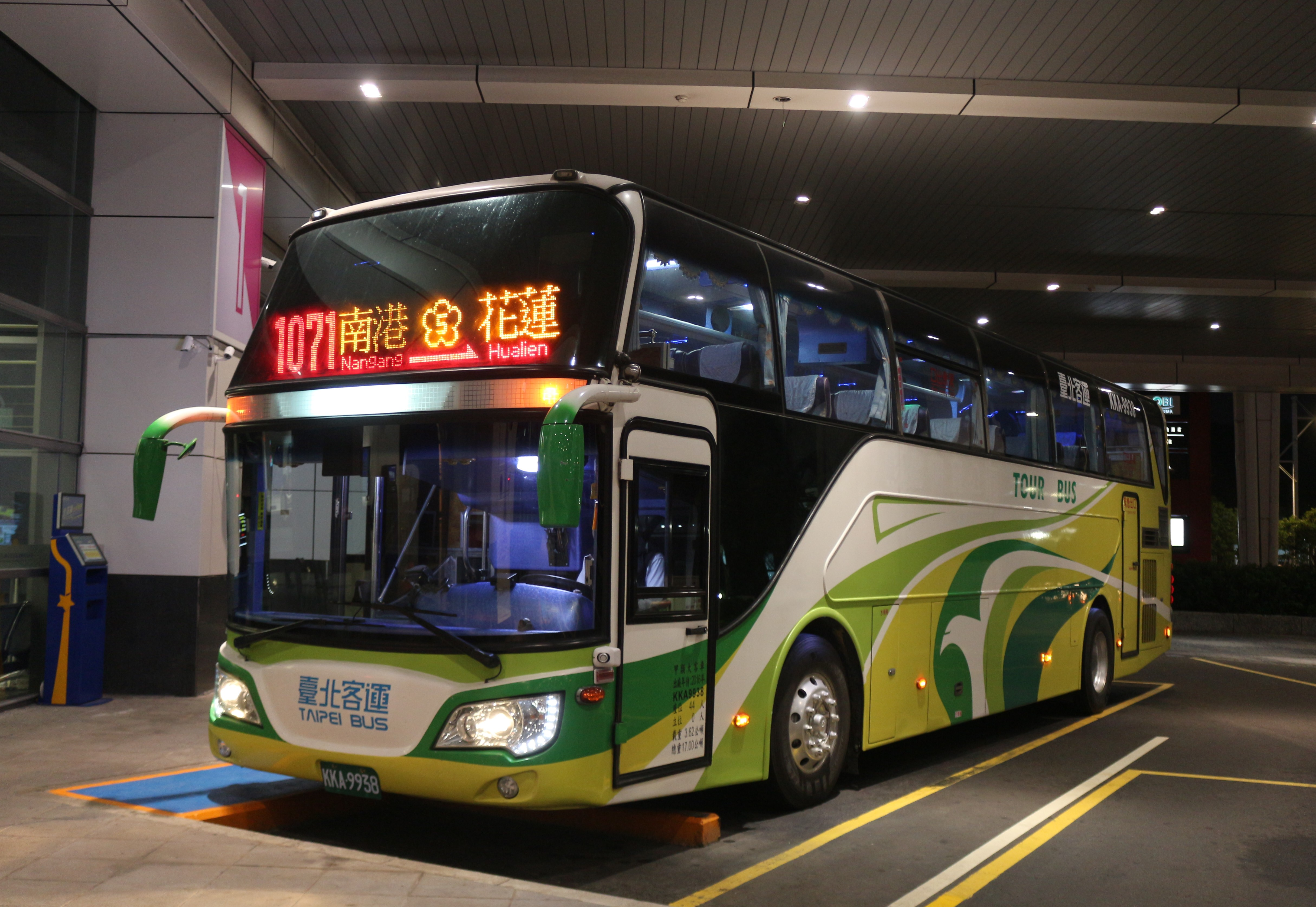 北花客運圖片